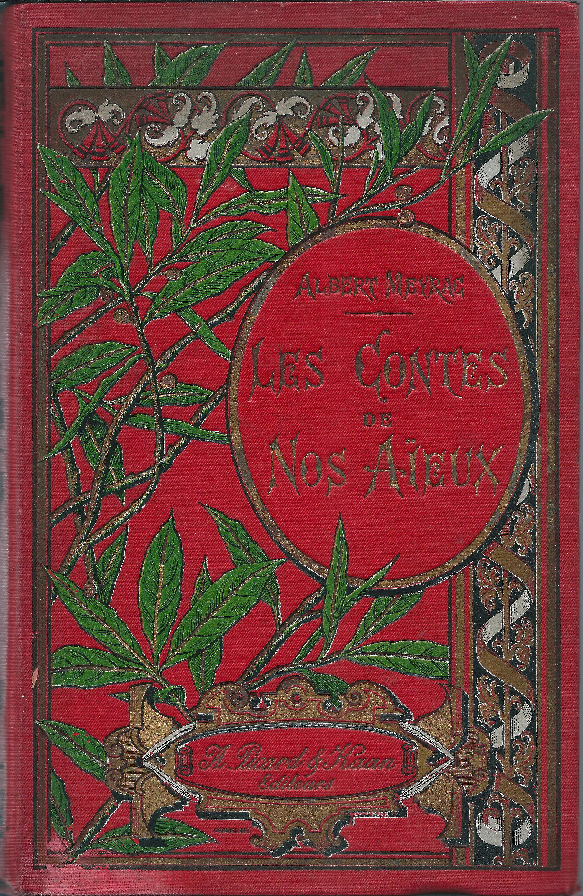 Couverture des Contes de nos Aïeux d'Albert Meyrac, en 1897